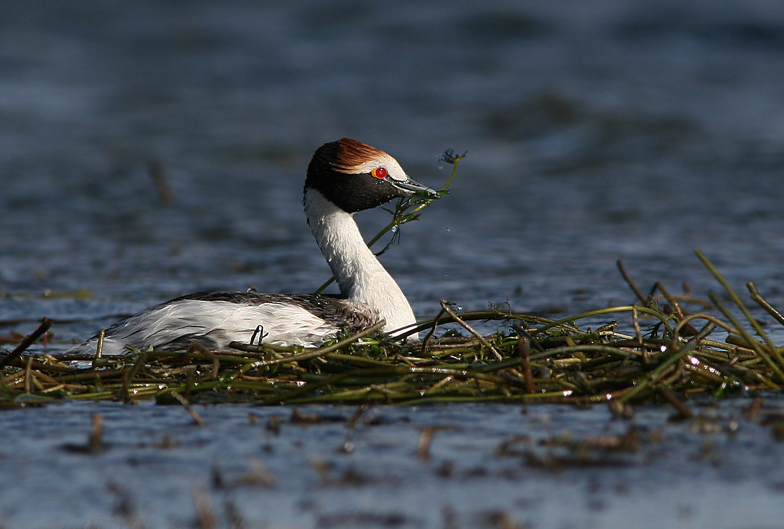 El Macá tobiano (Podiceps gallardoi) es una especie de ave en peligro de extinción que habita en la Patagonia argentina y chilena.